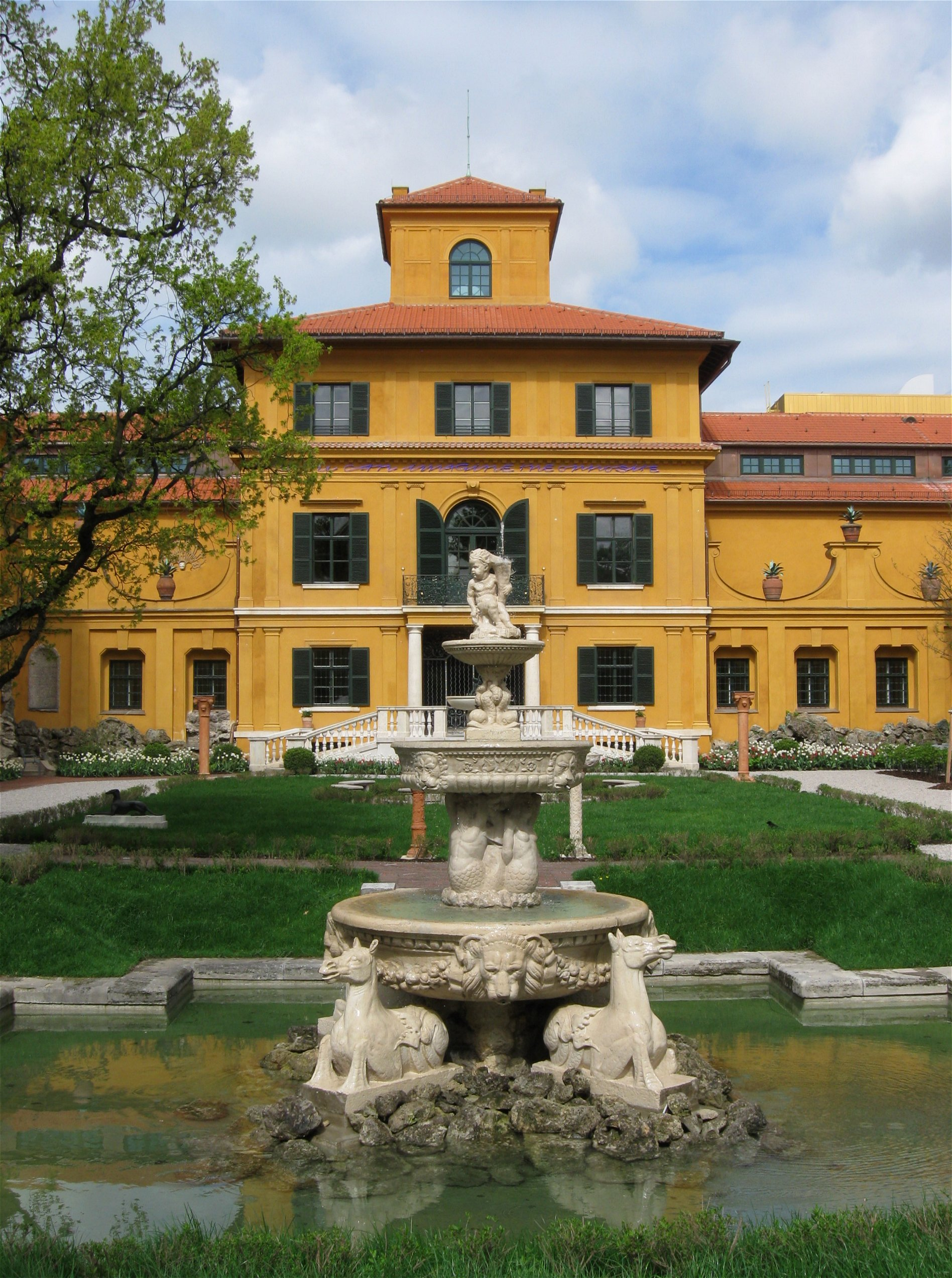 Lenbachhaus, München, kurz vor der Wiedereröffnung